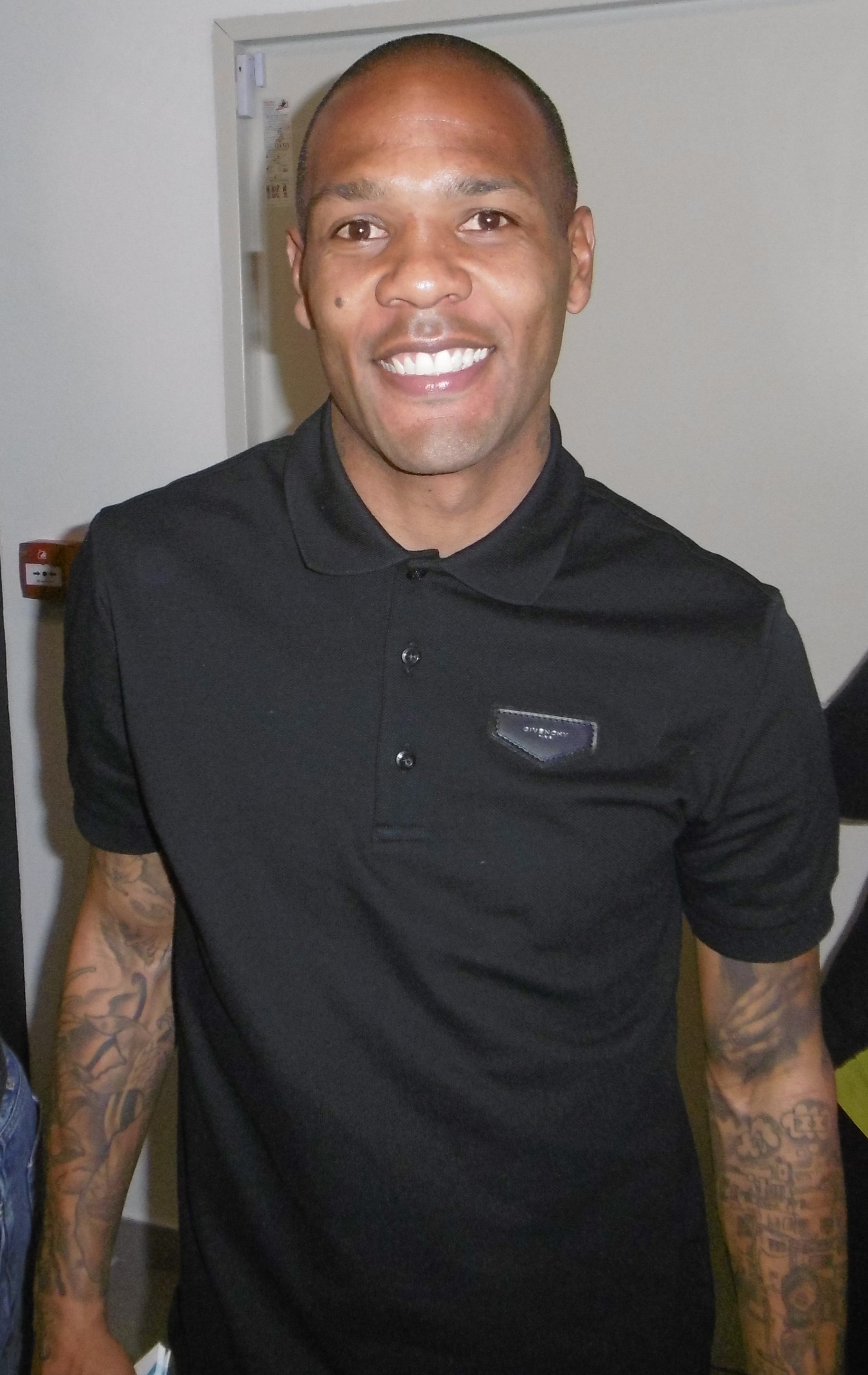 Everton Luiz Guimarães Bilher, giocatore della Spal